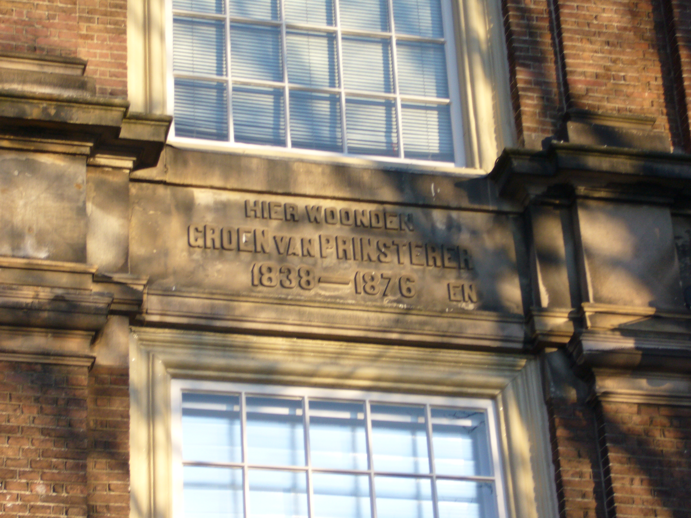 Den Haag, Korte Vijverberg 3, Kabinet der Koningin.Opschrift:Hier woonden Guillaume Groen van Prinsterer1838–1876 en